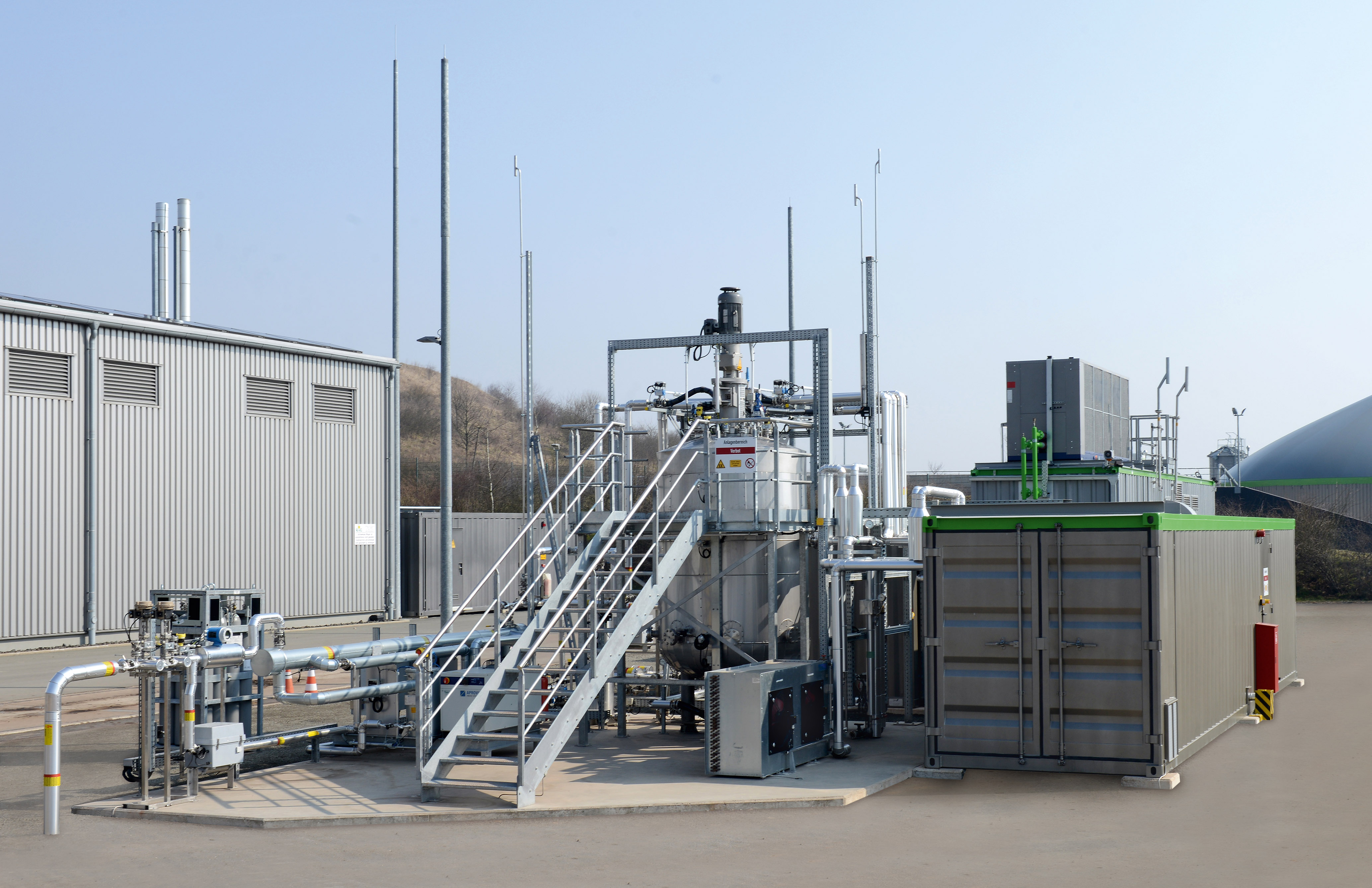 Biologische Methanisierungsanlage